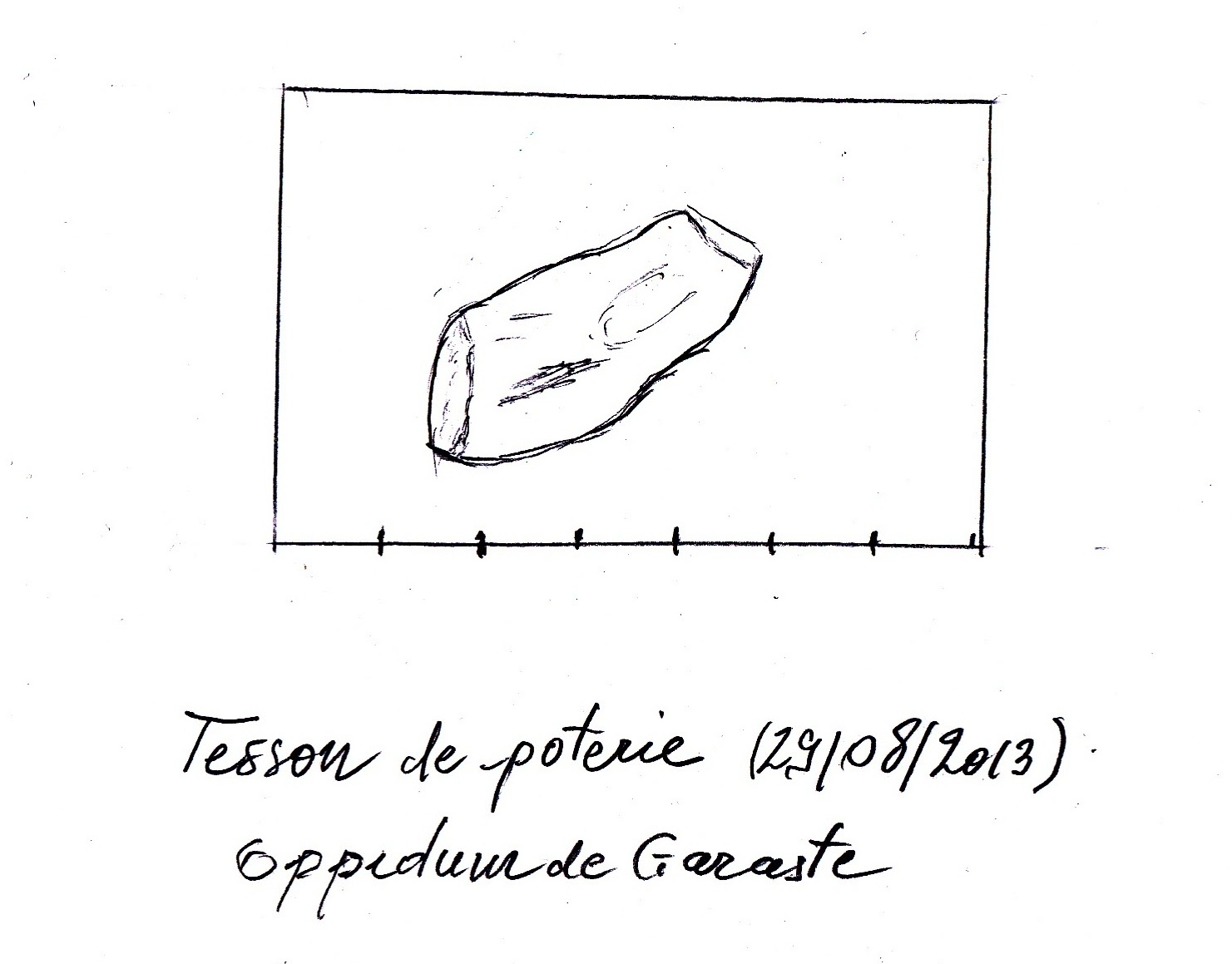 Dessin tesson de poterie à pâte jaune - Saint-Vincent-de-Barbeyrargues (Hérault)